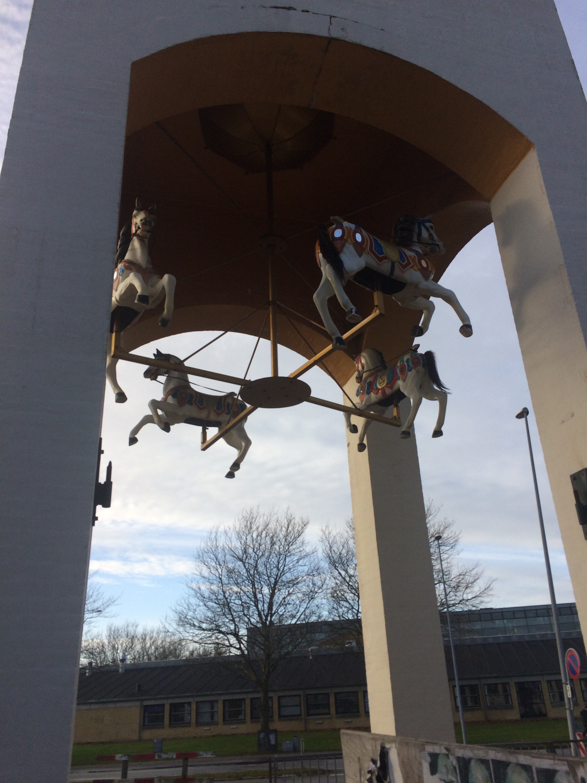 De ikoniske heste ved indgangen til Karolinelund, det tidligere Tivoliland